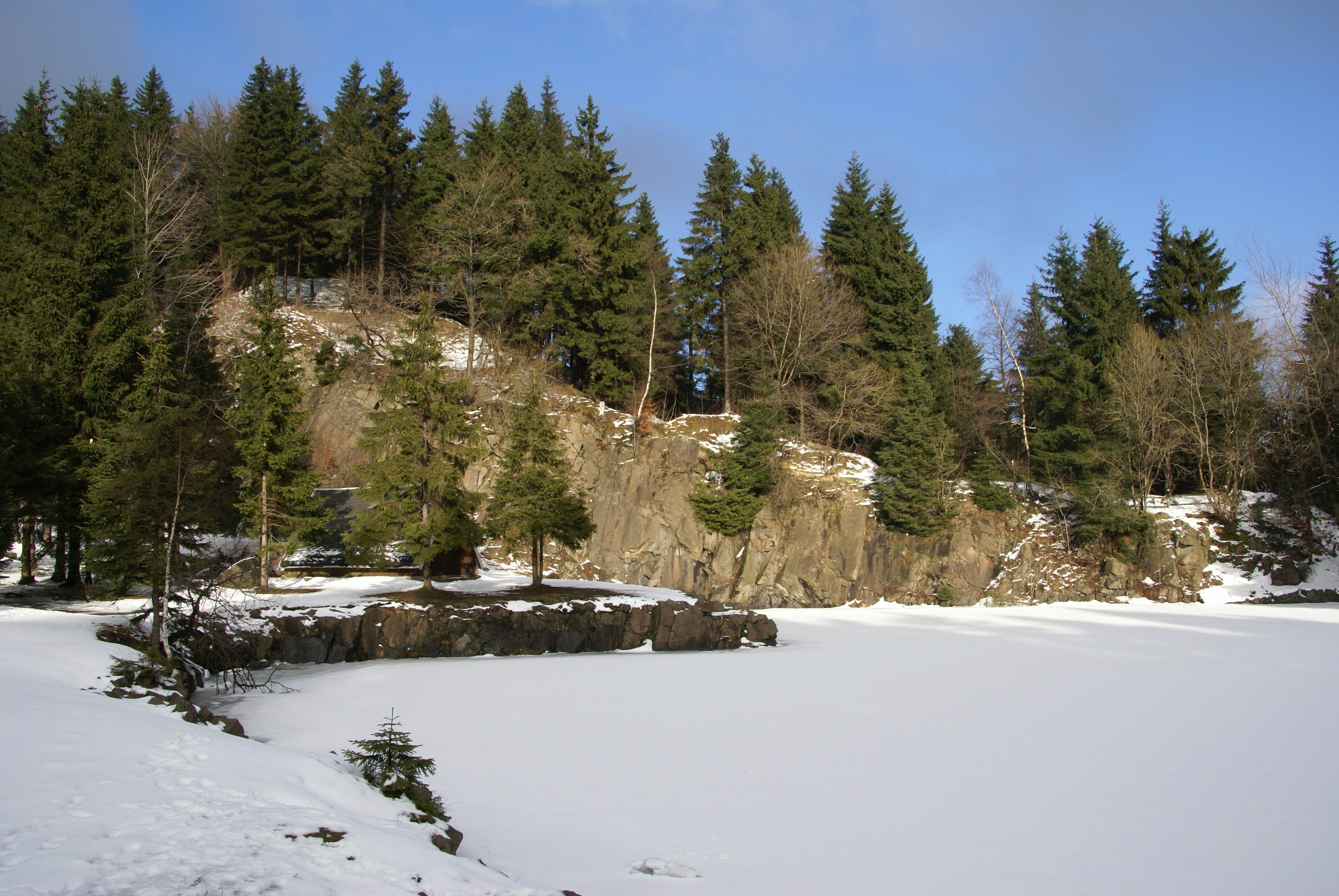 Der Bergsee Ebertswiese bei Floh-Seligenthal im Winter.